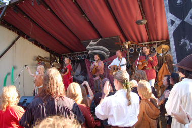 Die Streuner, Mittelalterband aus Deutschland